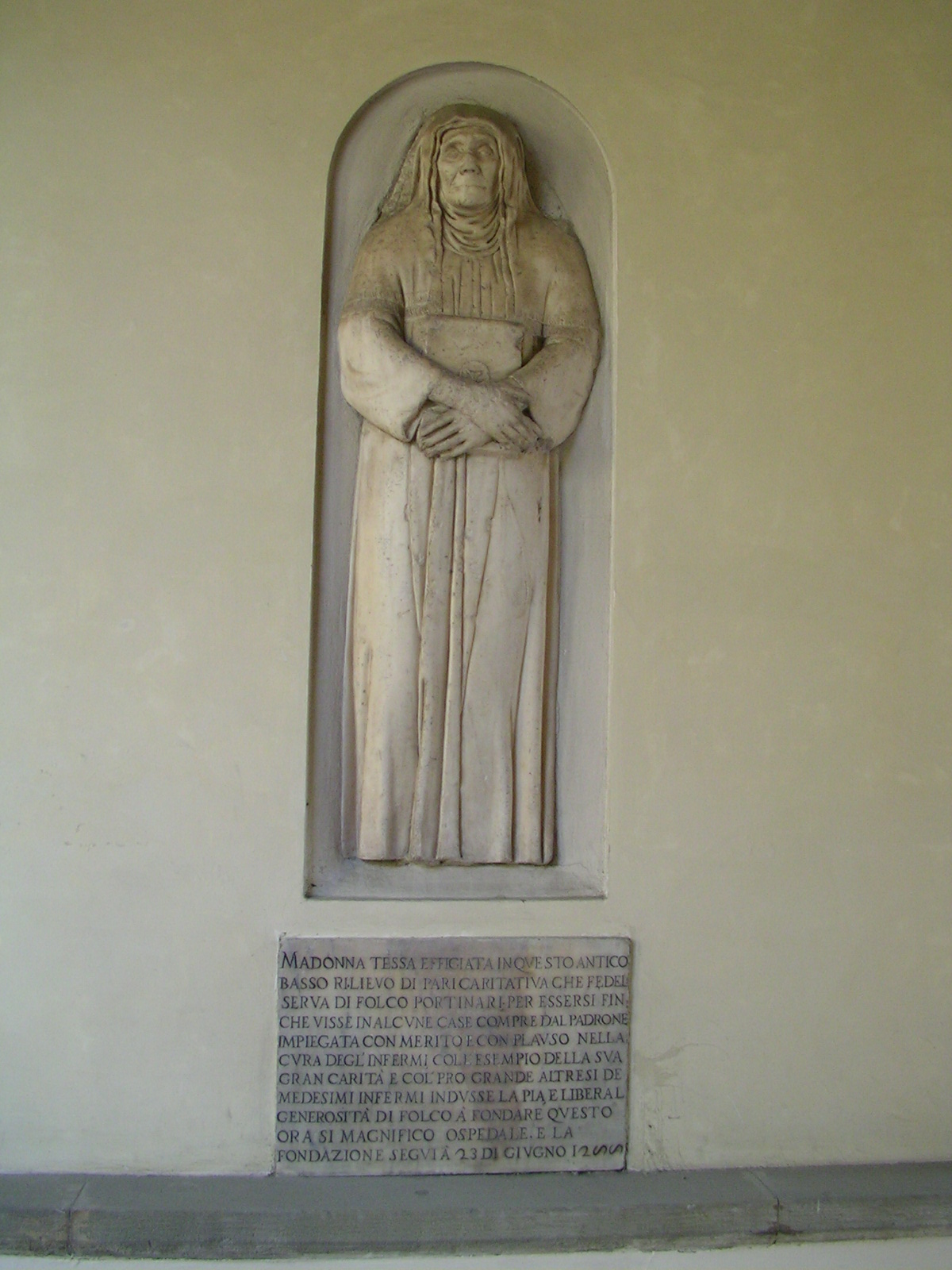 Monna Tessa Sculpture, from Ospedale di Santa Maria Nuova, front view in Florence, Italy